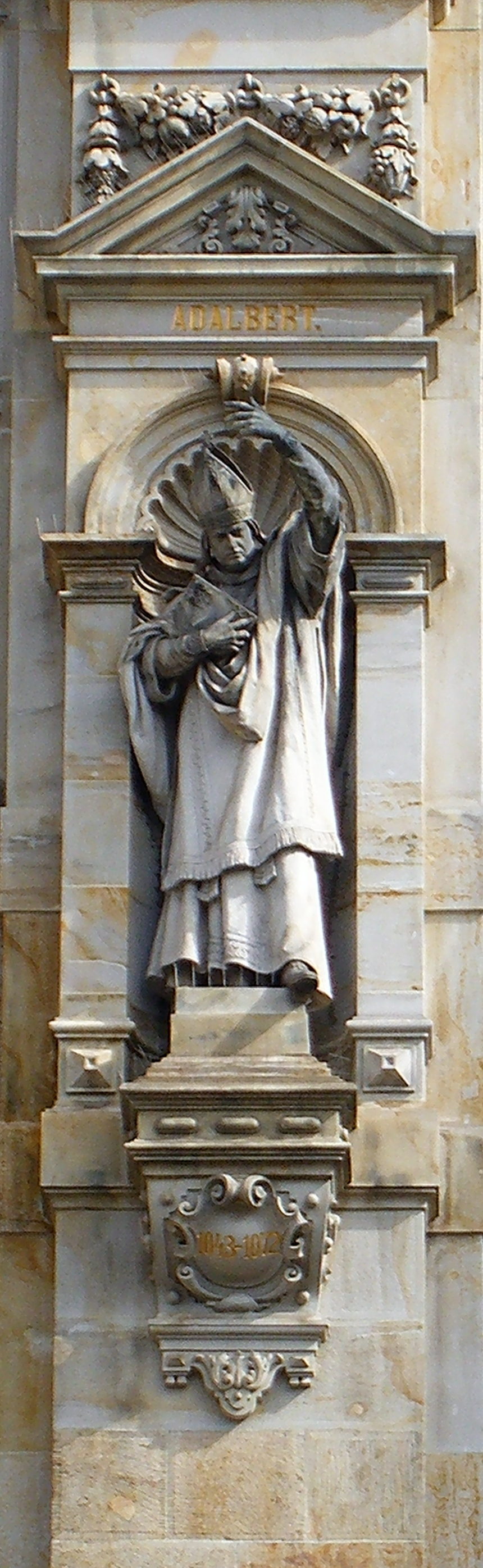 Standbild Adalbert von Bremen in der Fassade vom Hamburger RathausThis is a photograph of an architectural monument.